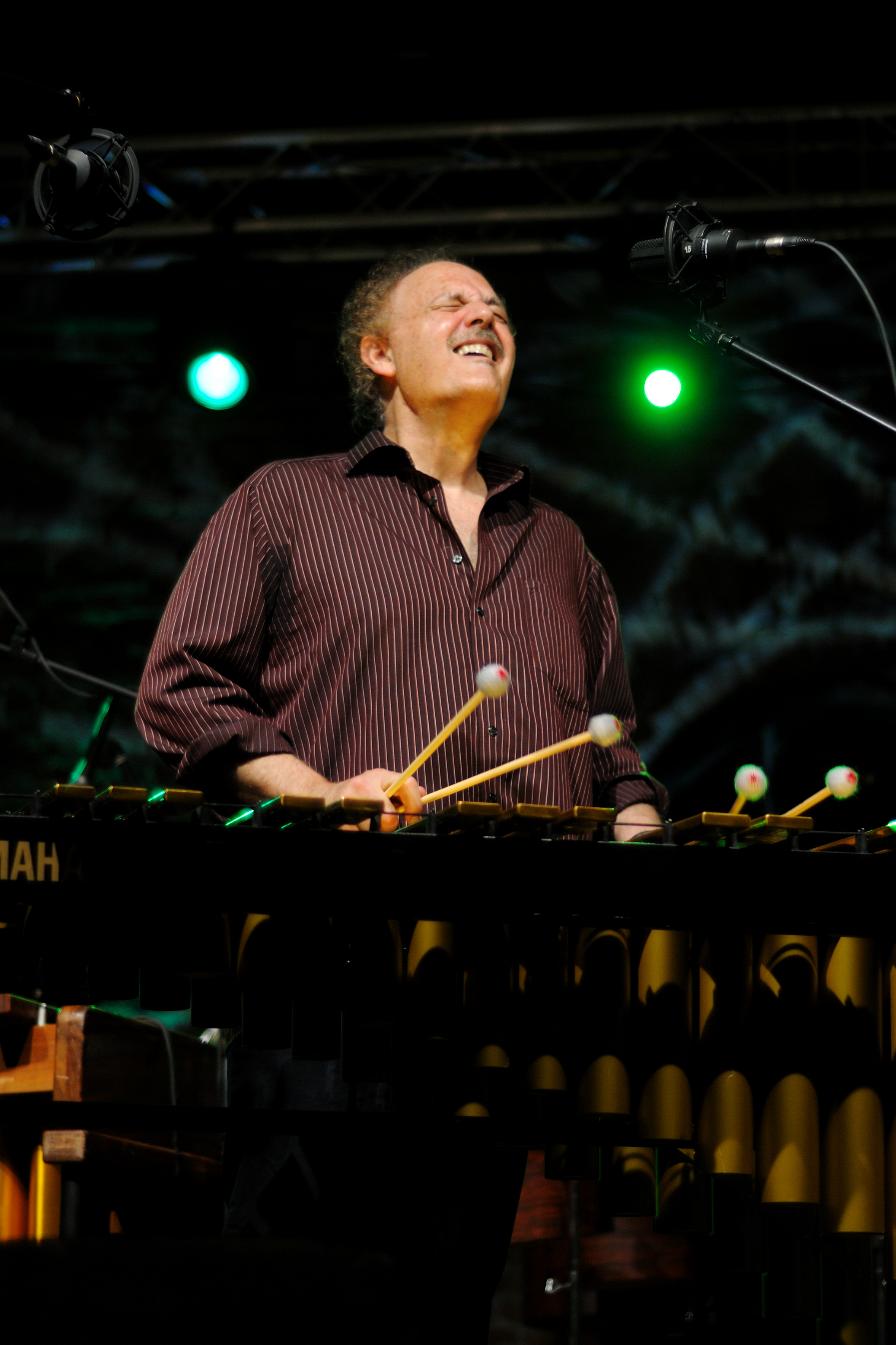 David Friedman & Peter Weniger